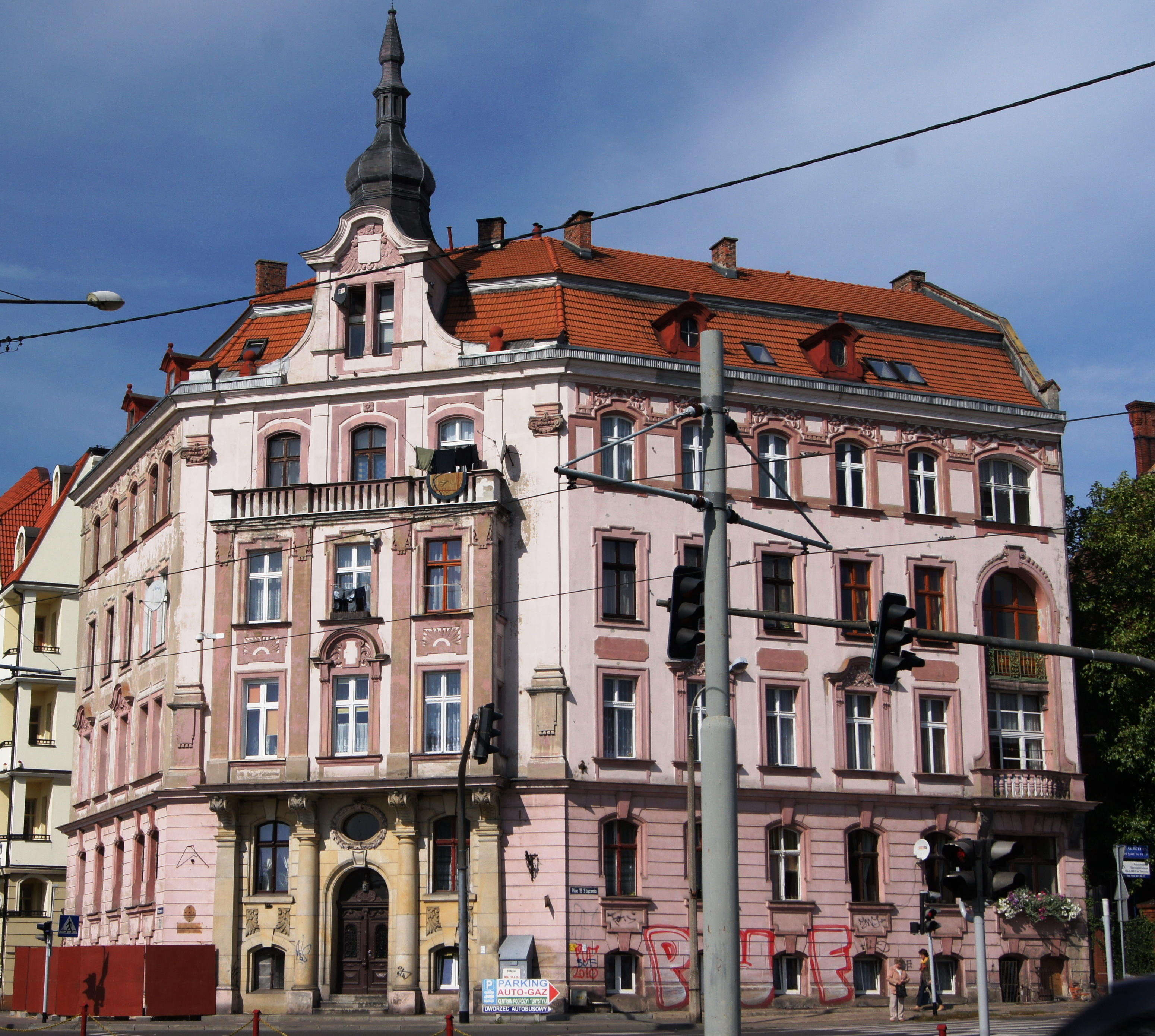 Toruń, ul. Warszawska 2 - kamienica, 1896-98 (zabytek nr A/1557 z 26.04.2010)